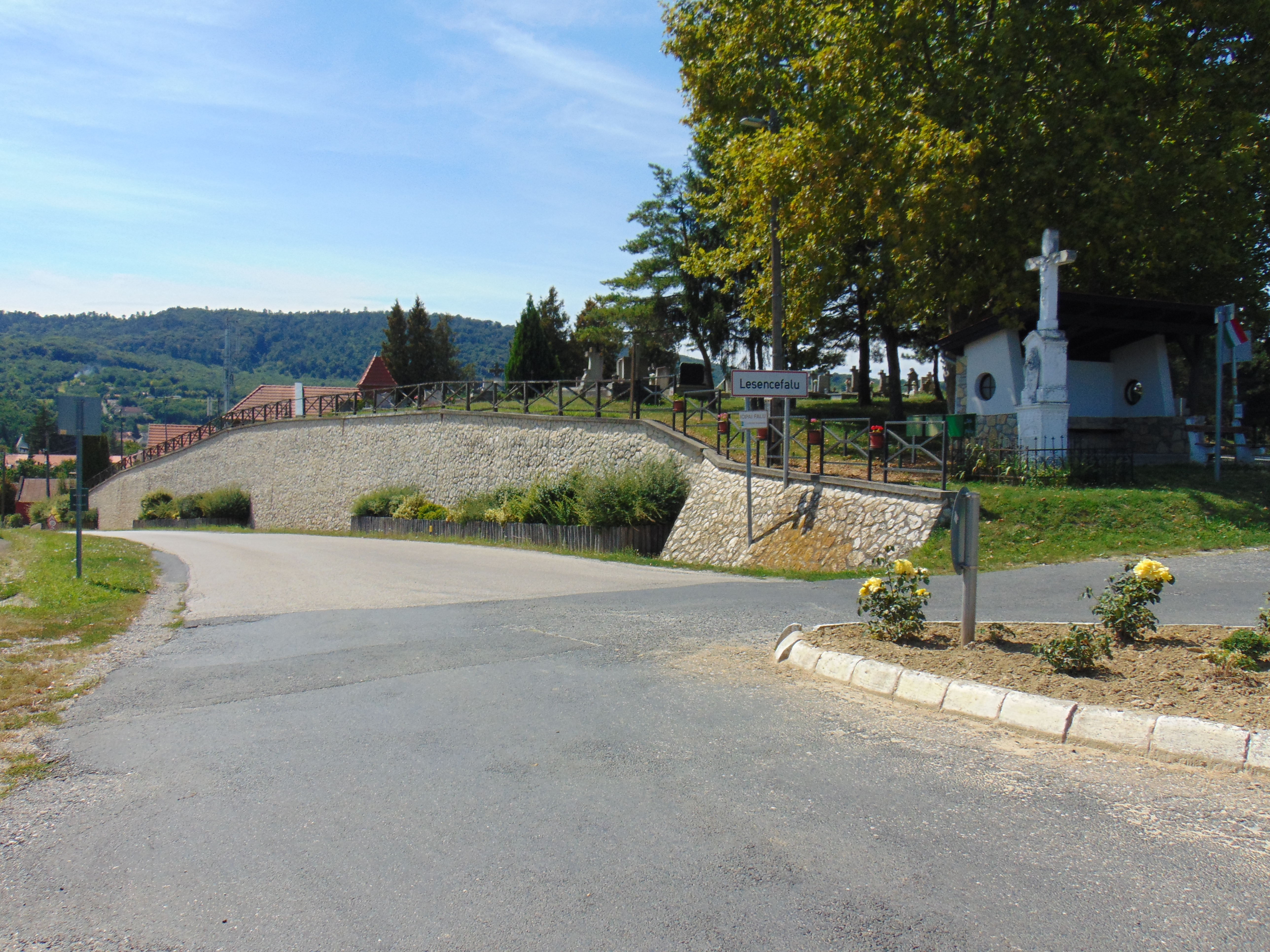 Lesencefalu bejárati útja